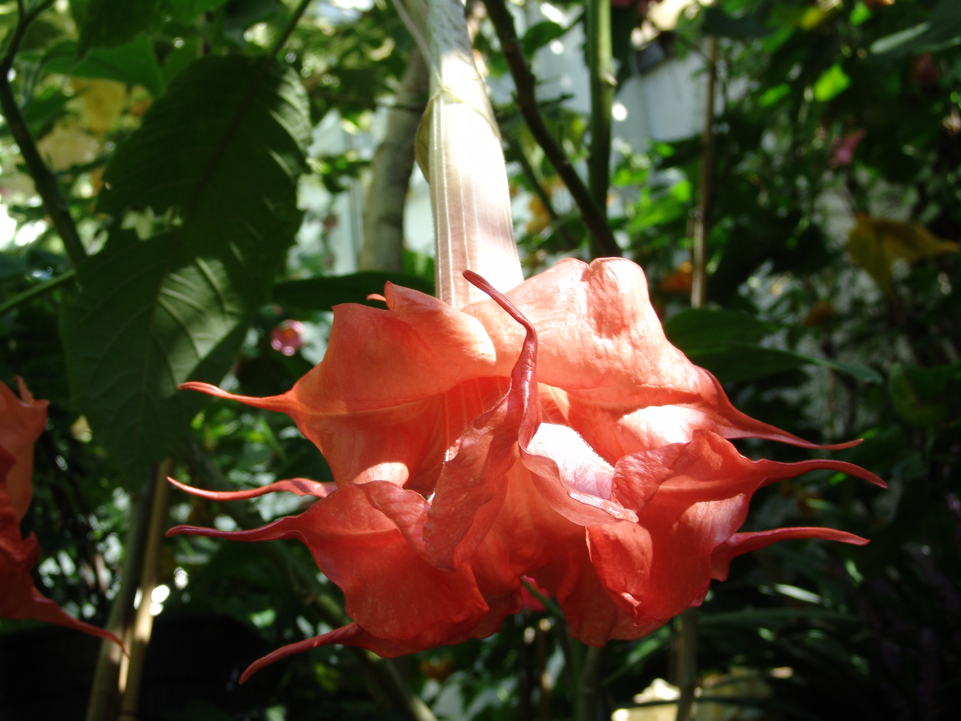 Bild einer gefüllten Engelstrompte